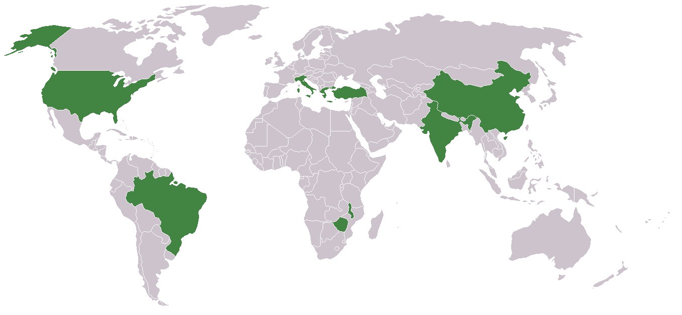 Karte der Staaten mit der größten Tabakernte